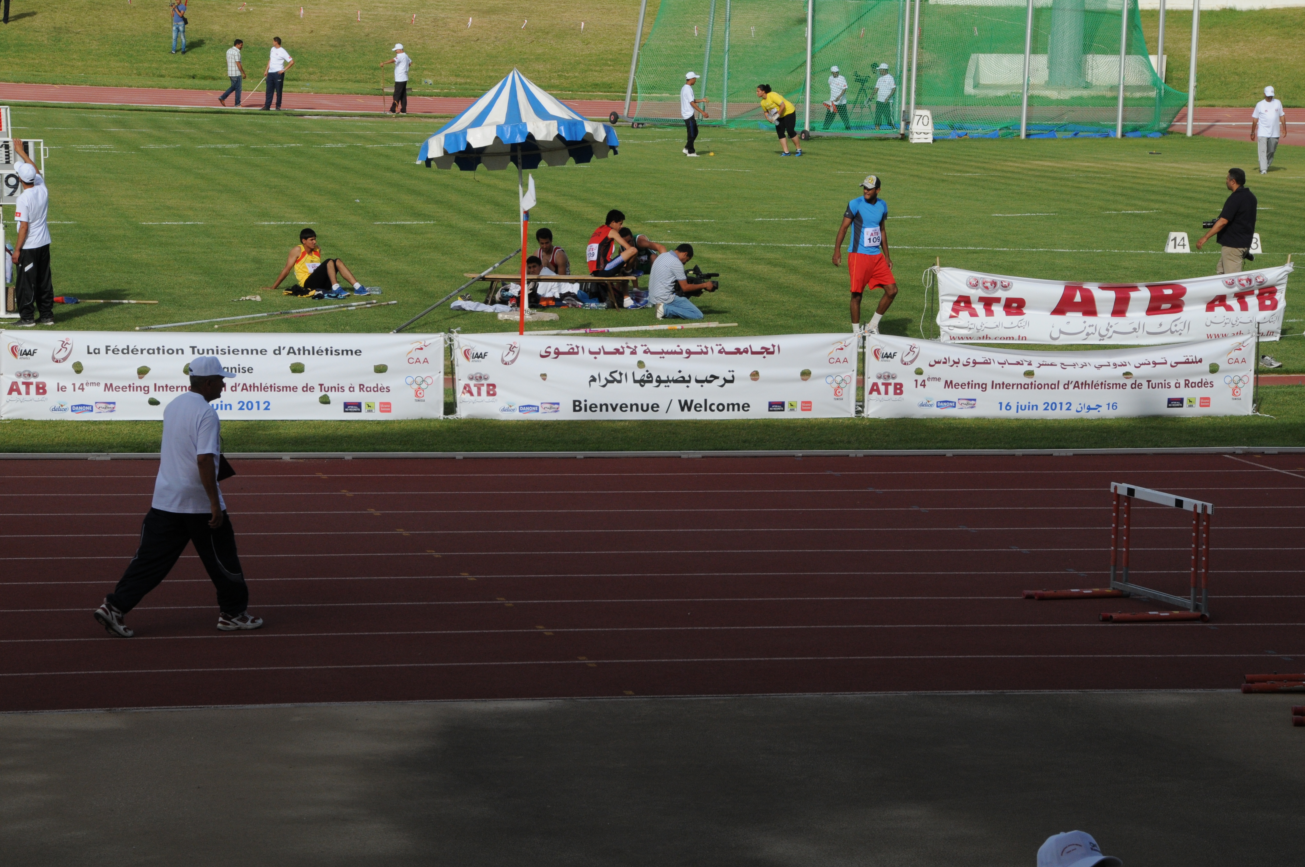 Stade d'Athlétisme de Radés lors du meeting international d'Athlétisme de Tunis édition 2012